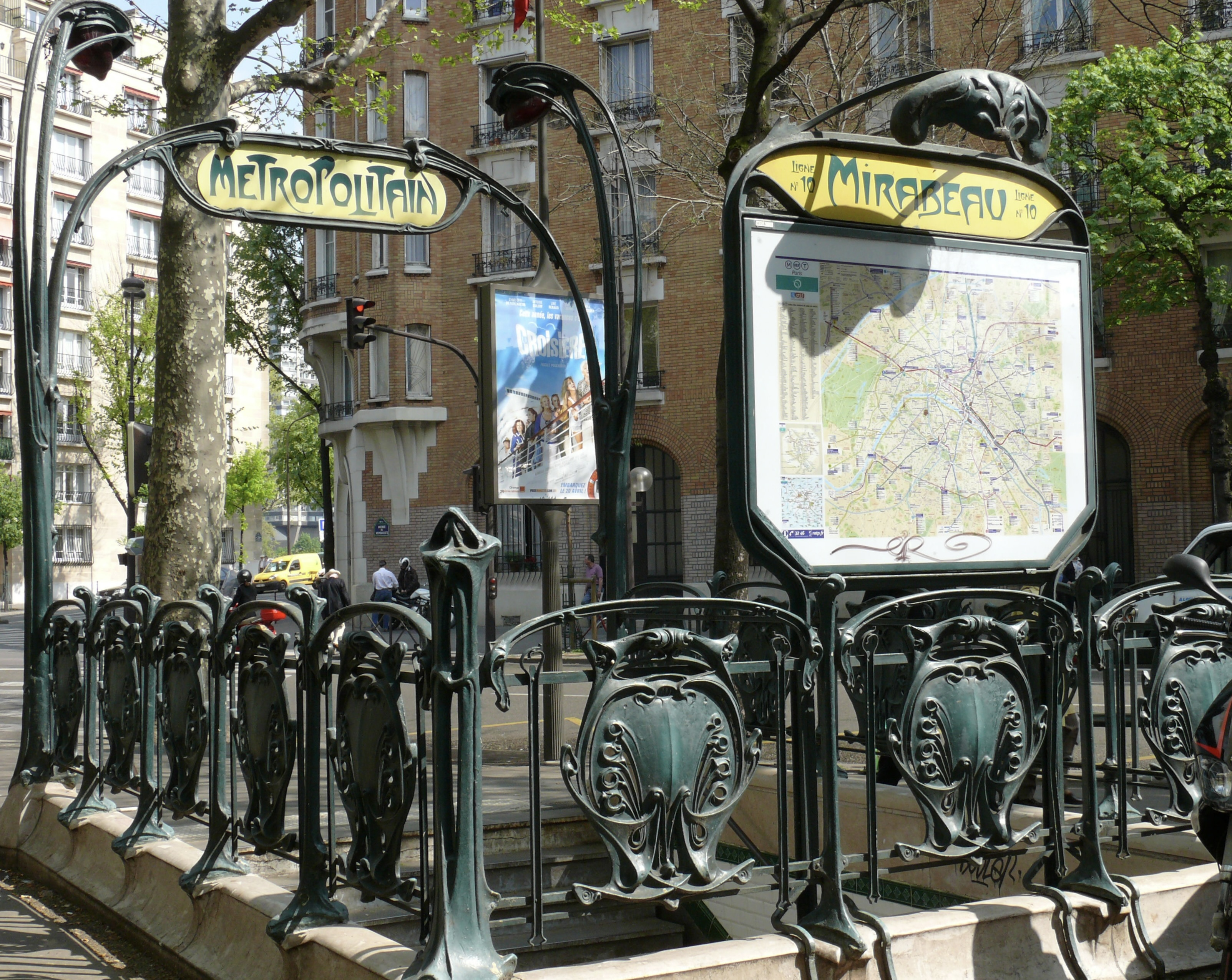 Edicule Guimard - Station Mirabeau